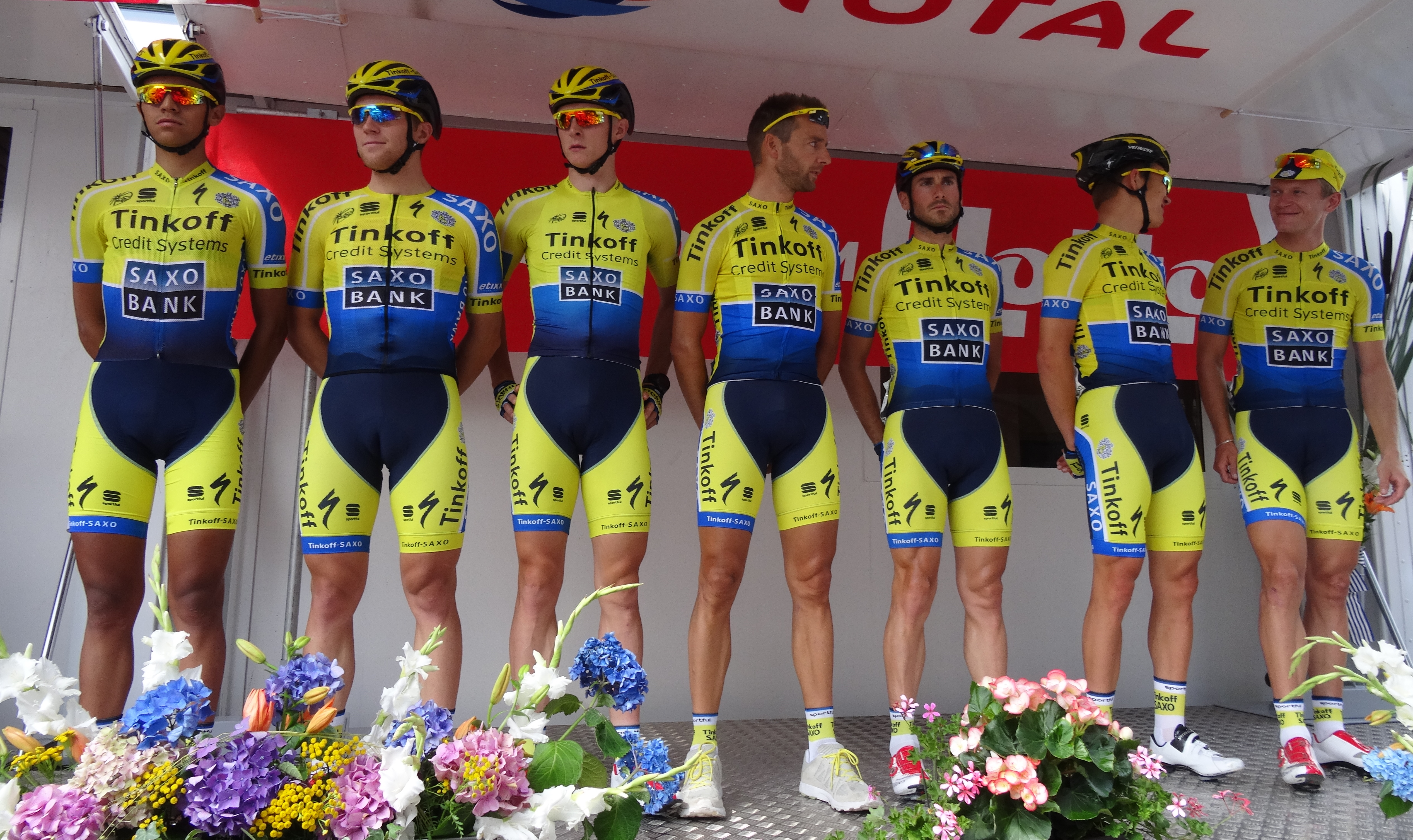 Reportage photographique réalisé le samedi 26 juillet à l'occasion du départ de la première étape du Tour de Wallonie 2014 à Frasnes-lez-Anvaing, Belgique.